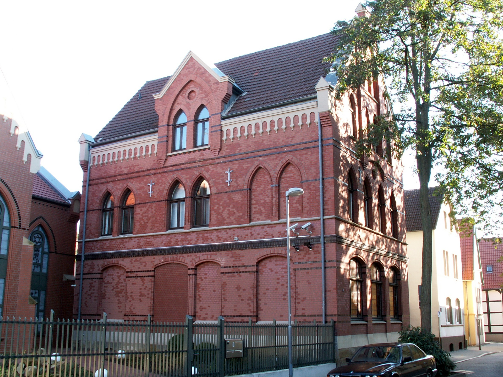 Jüdisches Gemeindehaus in Herford, Komturstraße 21, Baudenkmal Nr. 381, Ansicht von Westen